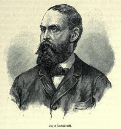 Portrait of Eugen Zhelekhivski (Євген Ієронімович Желехівський, 1844 - 1885), Ukrainian writer, philologist and public figure.